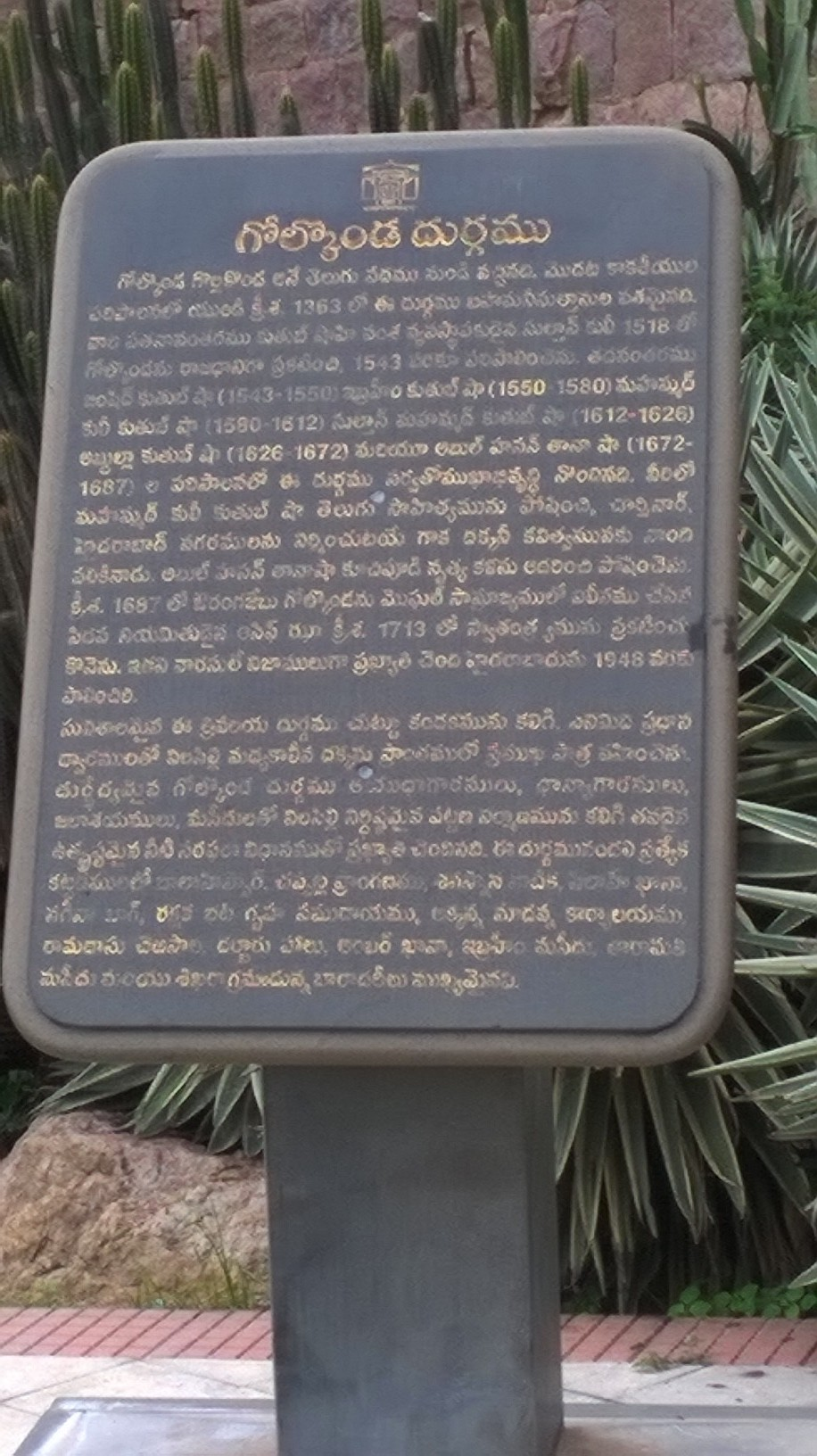 గోల్కొండ దుర్గం గూర్చి శిలాఫలకం